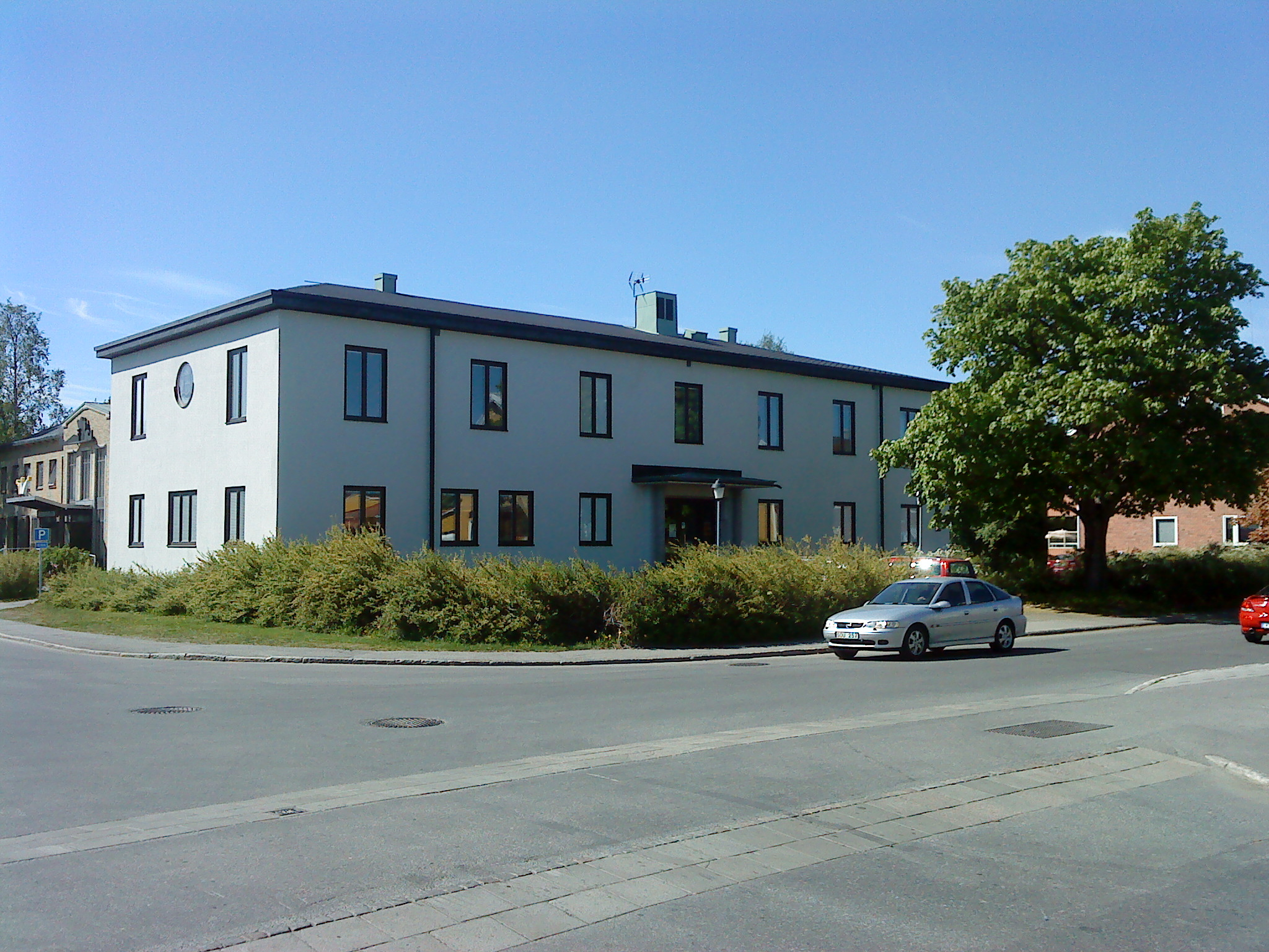 Skellefteå landskommuns "stadshus" (numer del av Västerbottensteatern). Arkitekt Birger Dahlberg.